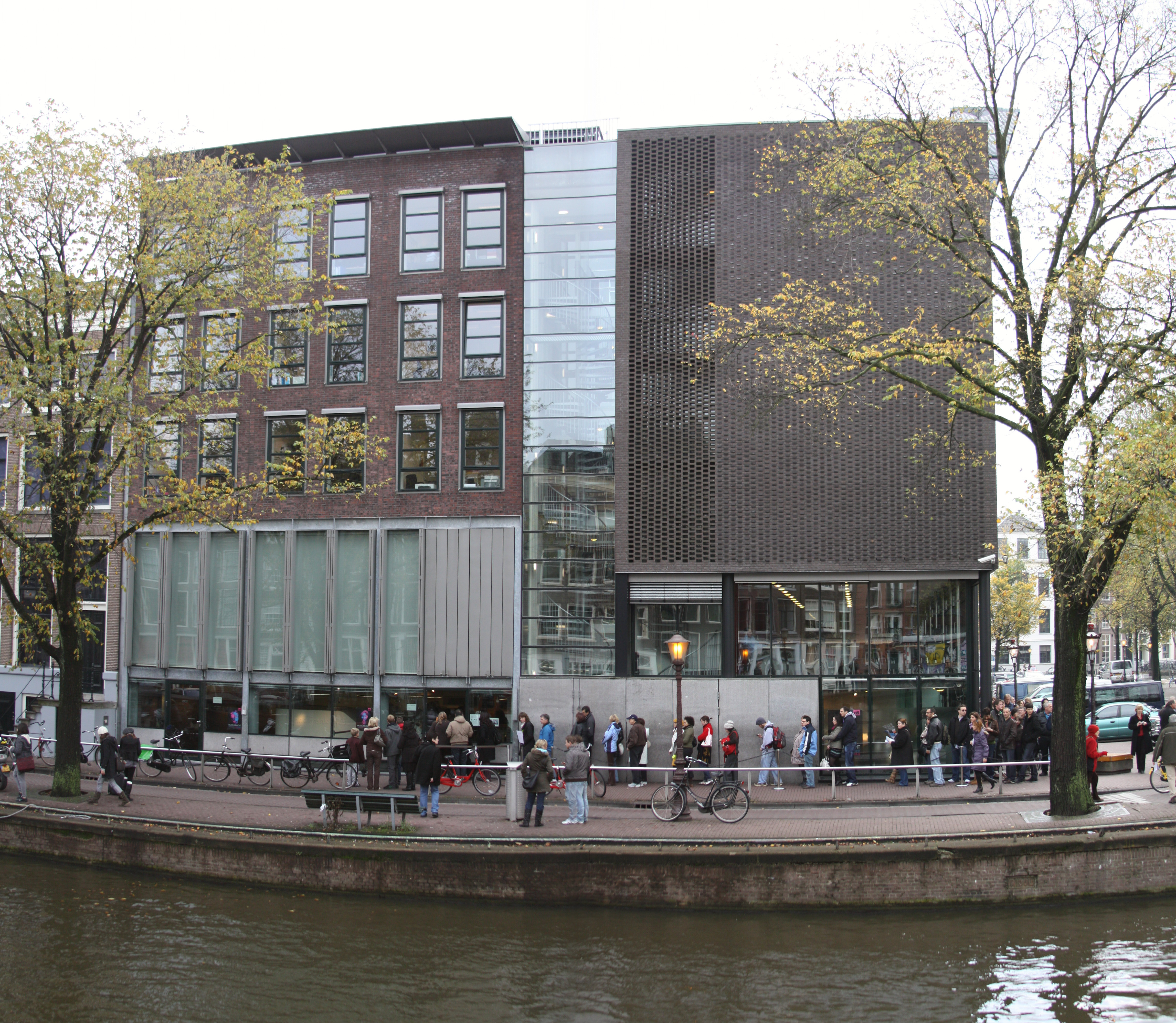 Amsterdam Zentrum